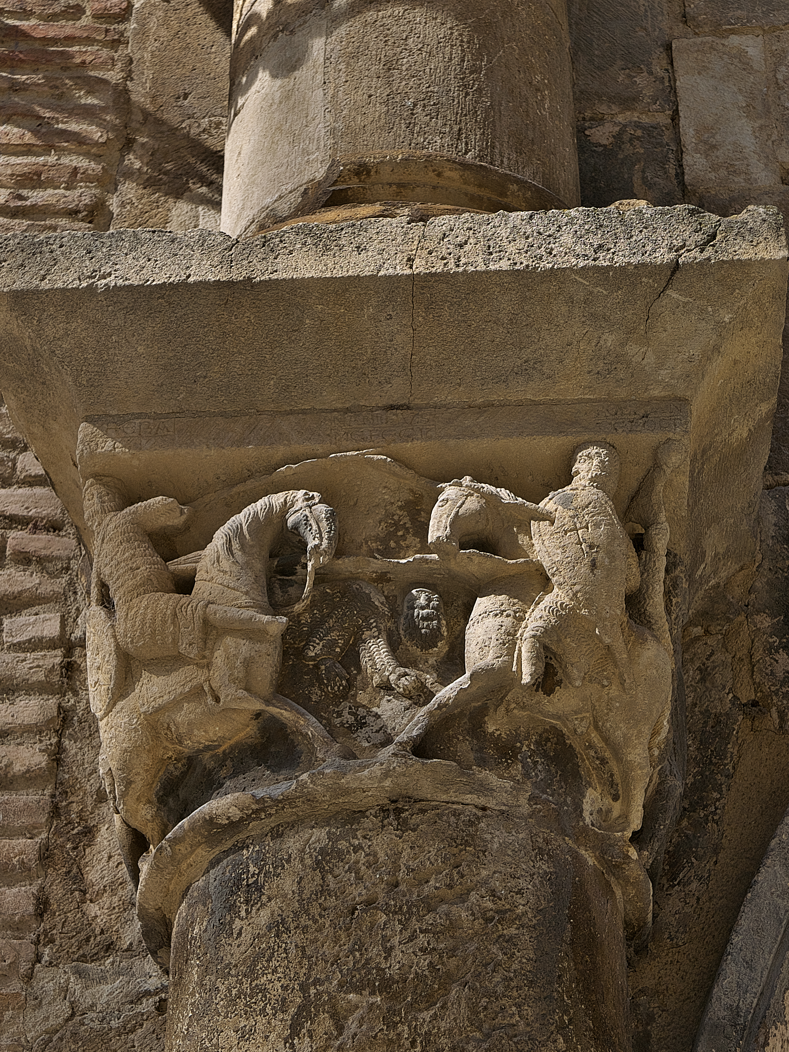 Capitel del Palacio de los Reyes de Navarra (Estella). Roldán lucha y vence al musulmán Ferragut.